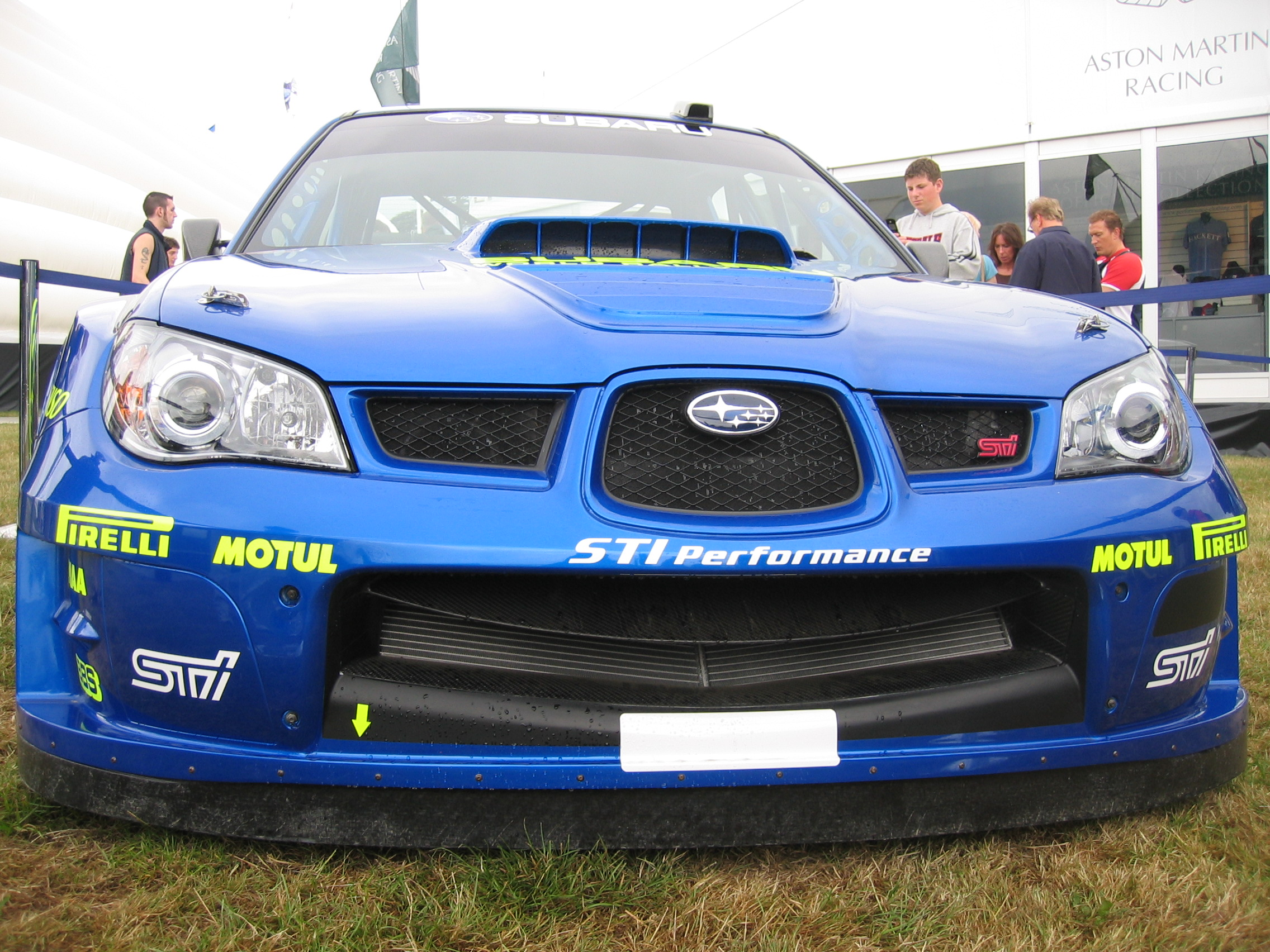 Subaru Impreza S12 (WRC) at 2006 GFoS.